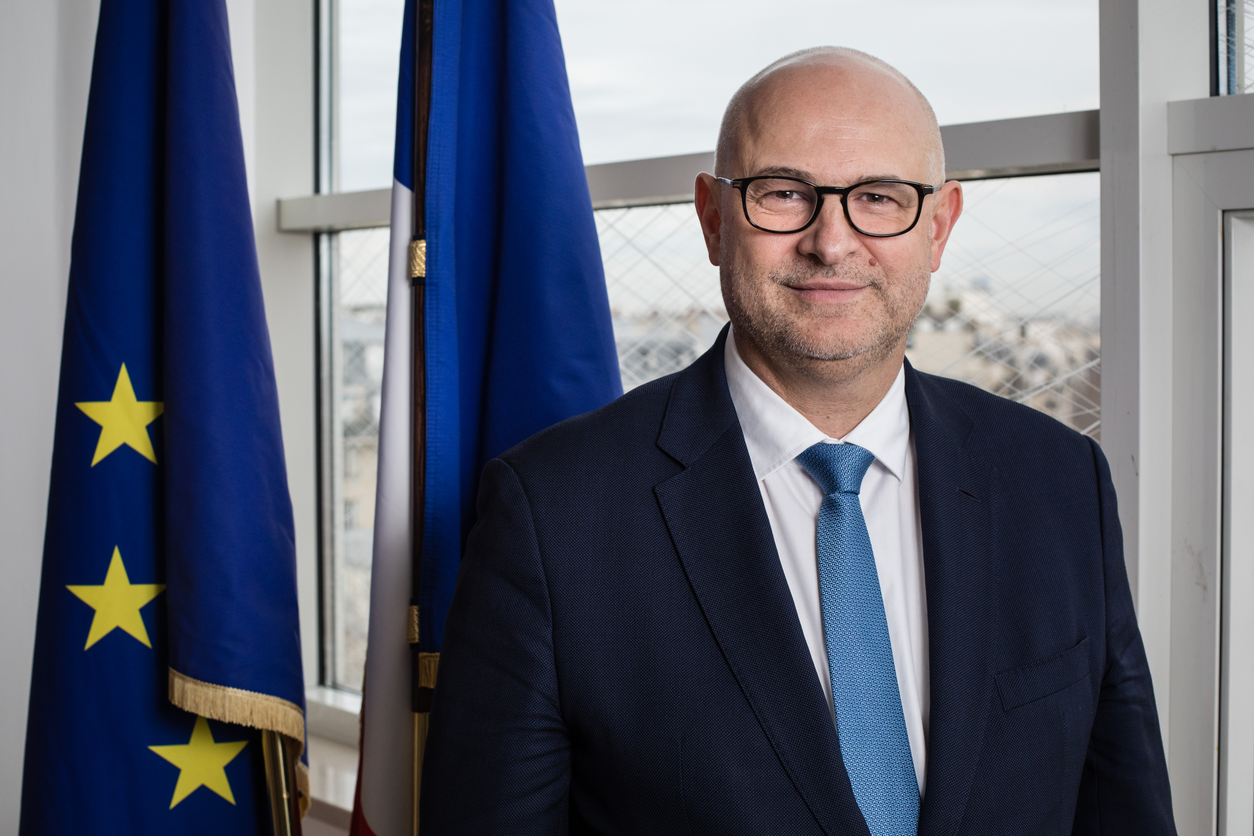 Photo du secrétaire d'état